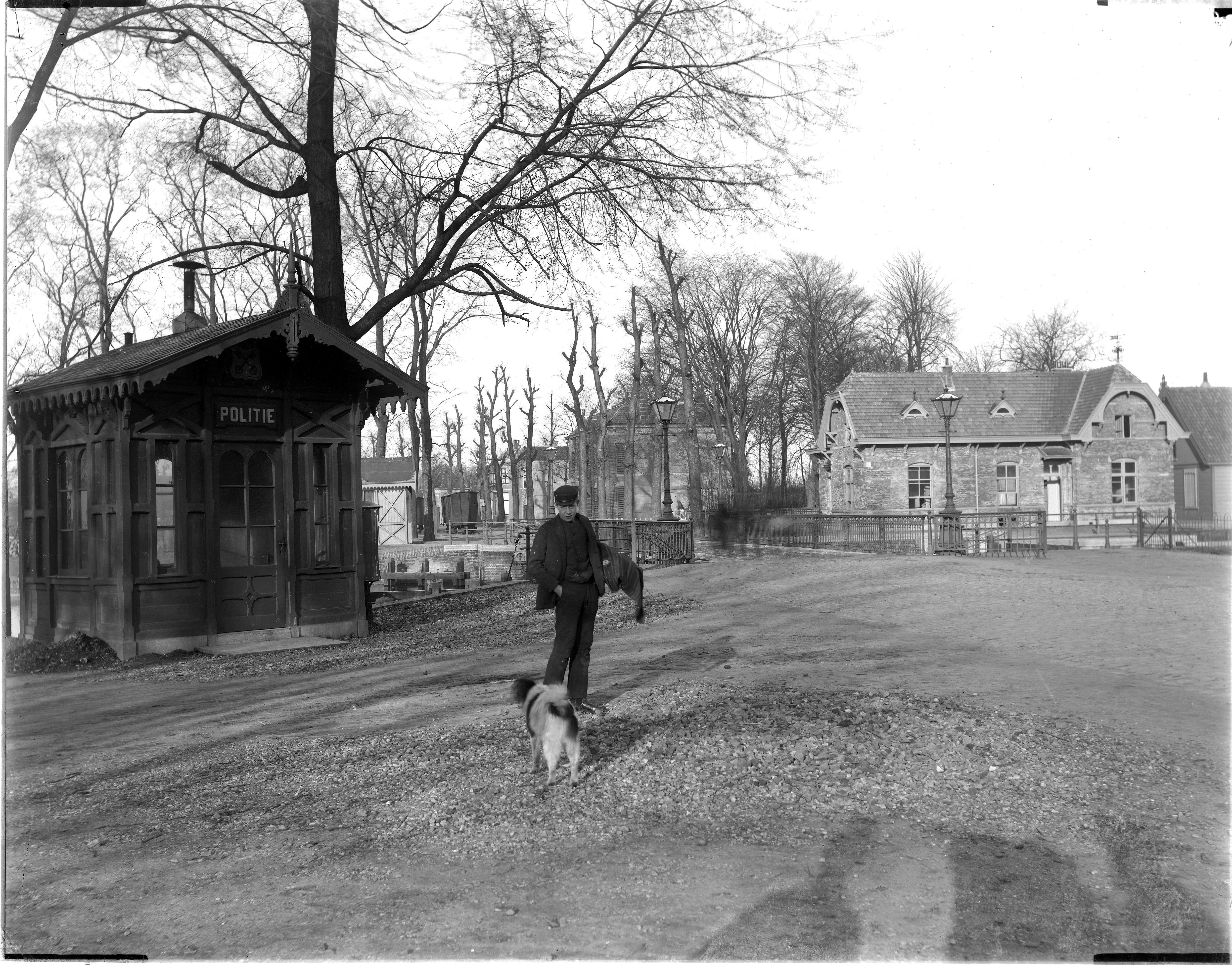 Haagbrug over de Trekvliet gezien van Noordeindsplein bij Wittesingel naar het westen naar de Haagweg. Links een Politieposthuisje en rechts de sluis- en brugwachterswoning. In 't verschiet een wagon van de stoomtram Leiden-Voorschoten. Foto vëër de bouw van de Ambachtschool (1883).